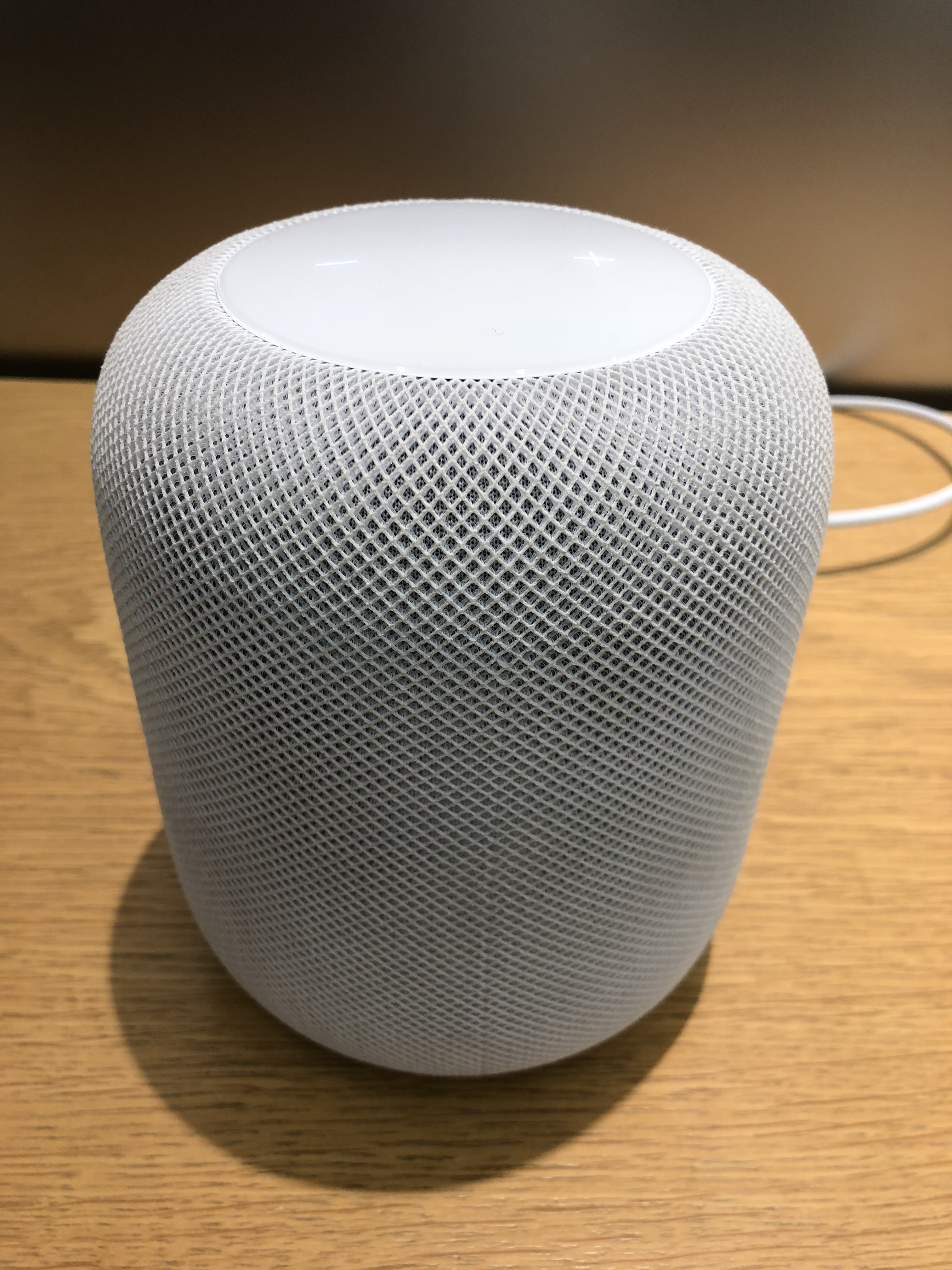 HomePod